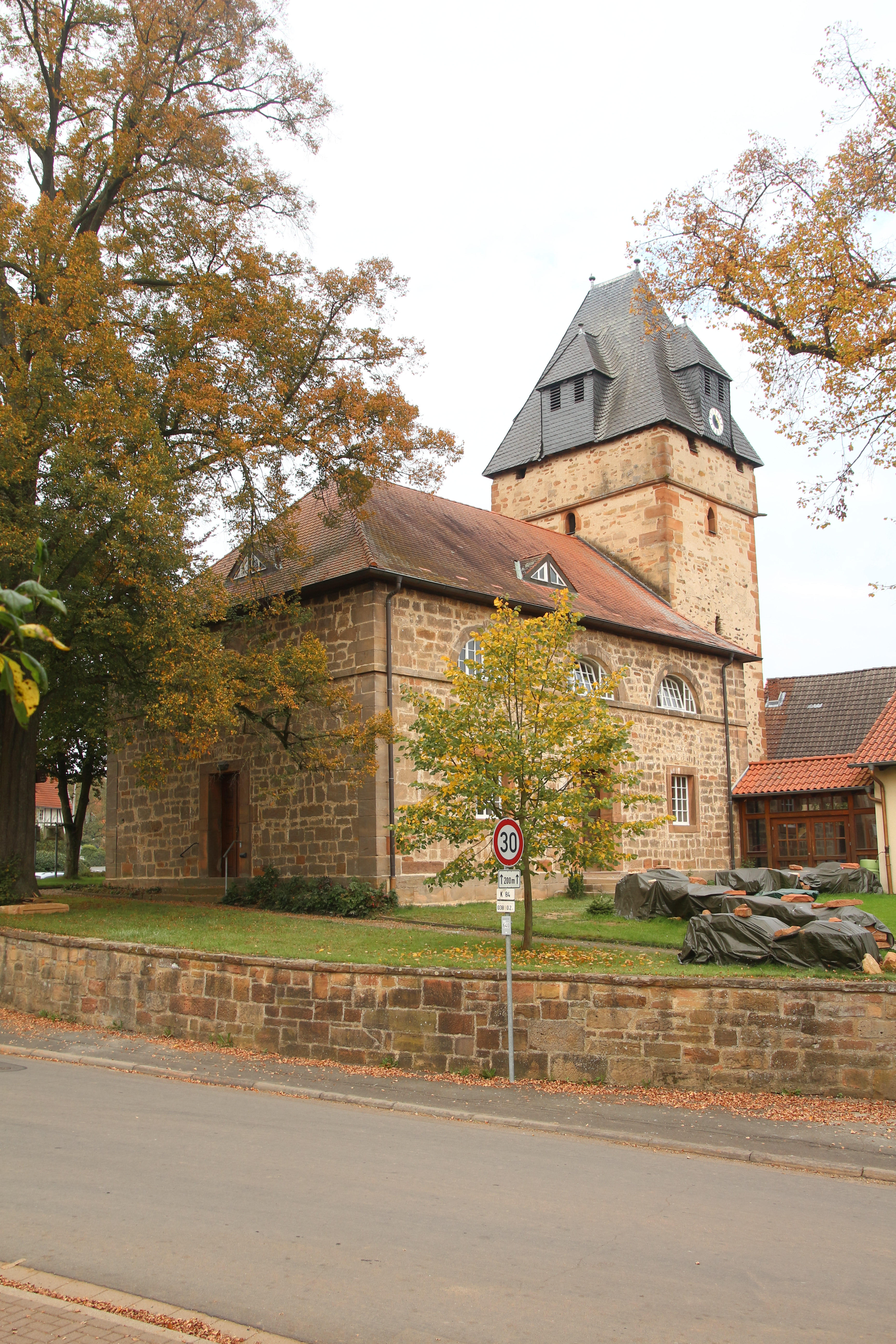 Evangelische Kirche Sterzhausen, Gemeinde Lahntal, Landkreis Marburg-Biedenkopf, Hessen